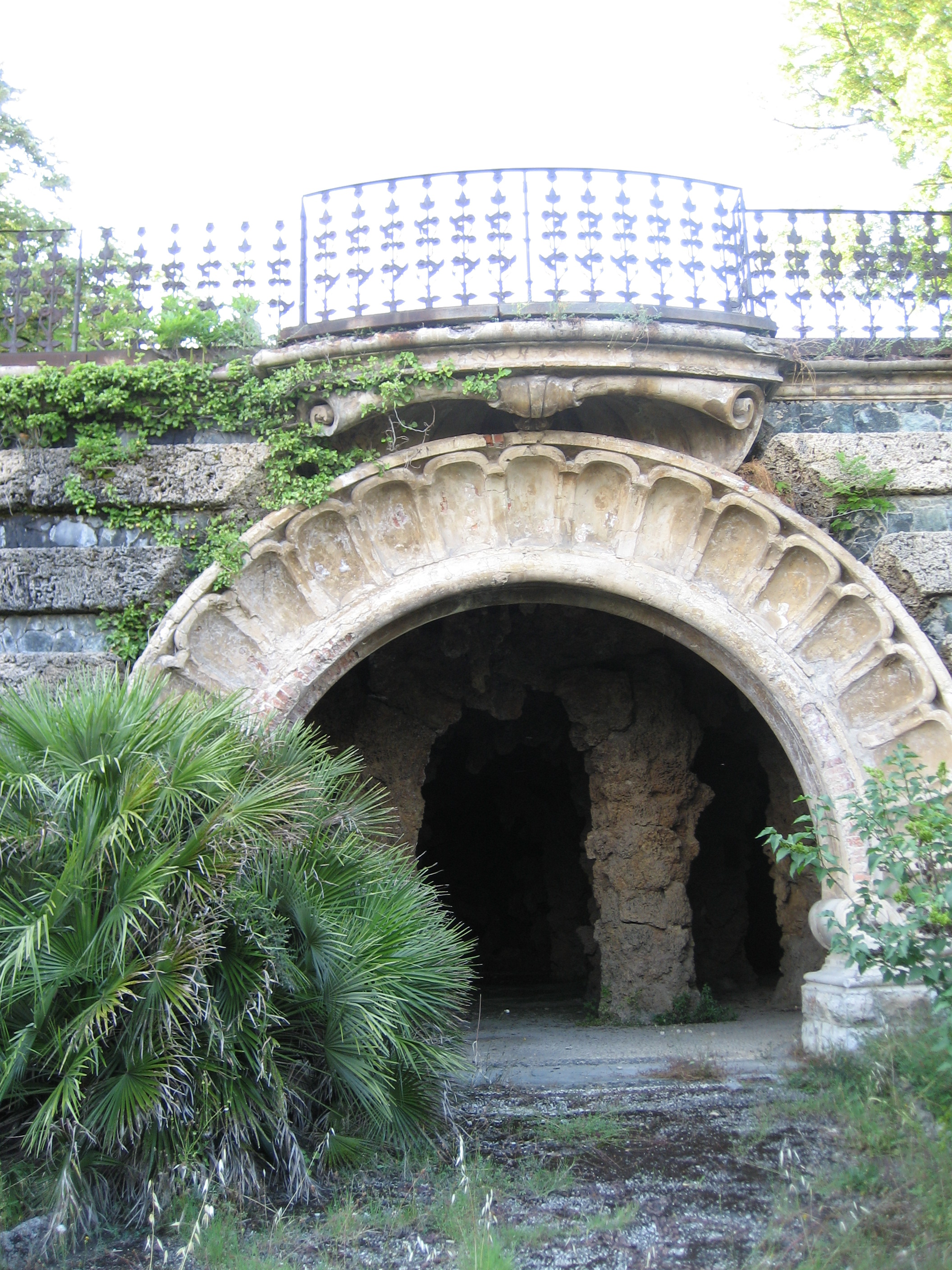 grotta